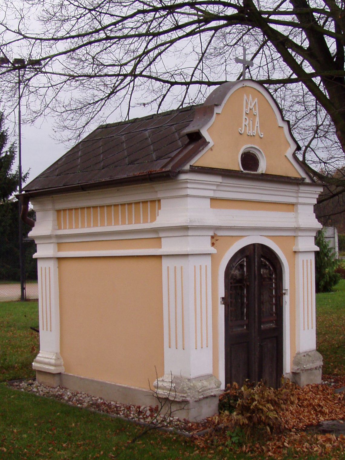 Kaple Panny Marie (Dobruška)